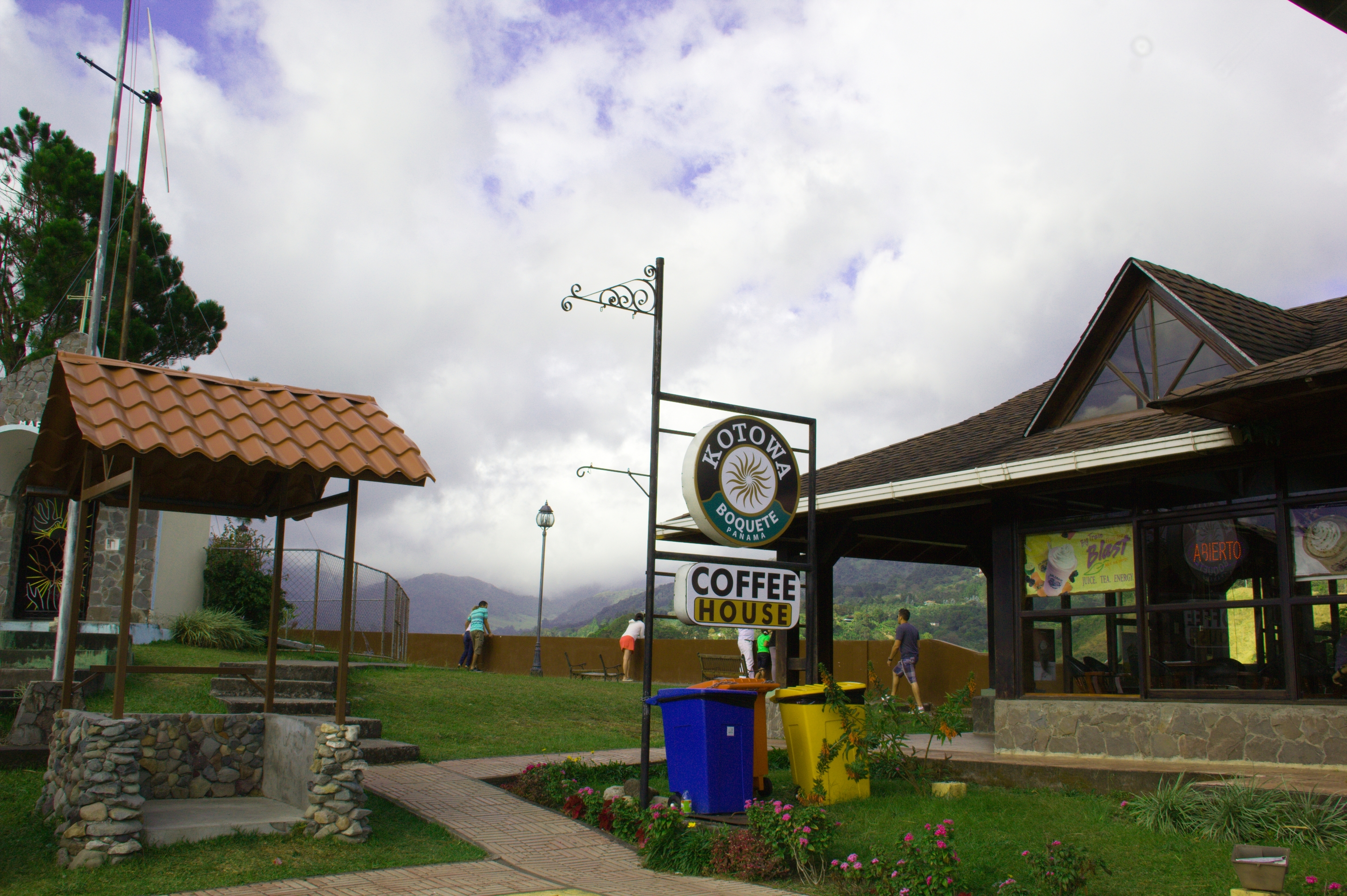 Cafetería y mirador en el poblado de Boquete, provincia de Chiriquí, Panamá.